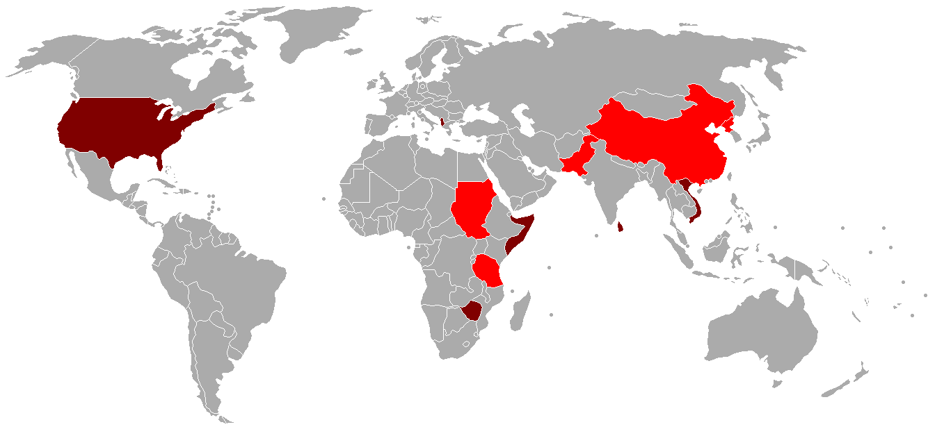 Usuarios del Shenyang J-5. Actuales en rojo, antiguos en rojo oscuro.